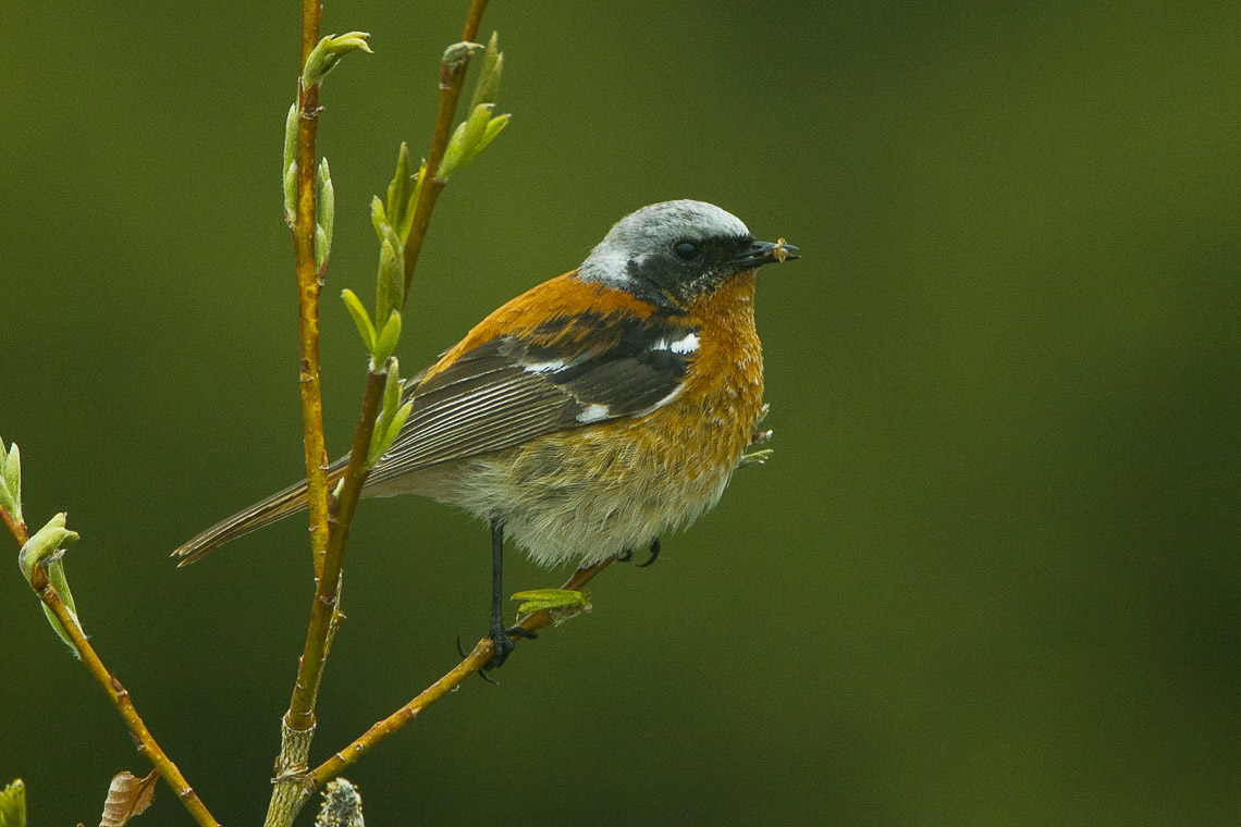 Eversmann's Redstart - Kazakistan_S4E3844